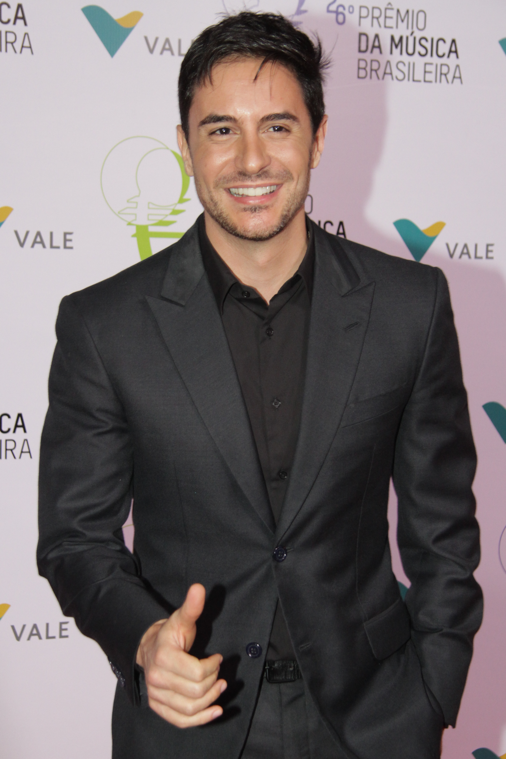 Ricardo Tozzi - 26° Prêmio da Música Brasileira 2015, no Theatro Municipal, no Centro do Rio de Janeiro/RJ. (10/06/15) Foto: Roberto Valverde/Divulgacão